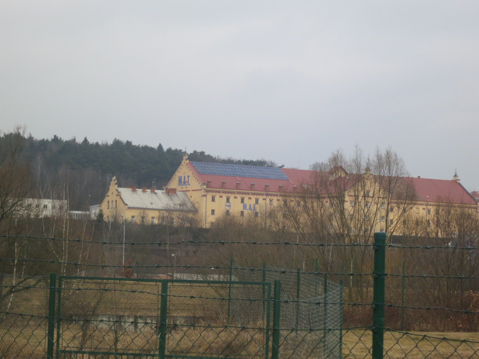 Pohled na bývalý Pivovar Prior v Plzni